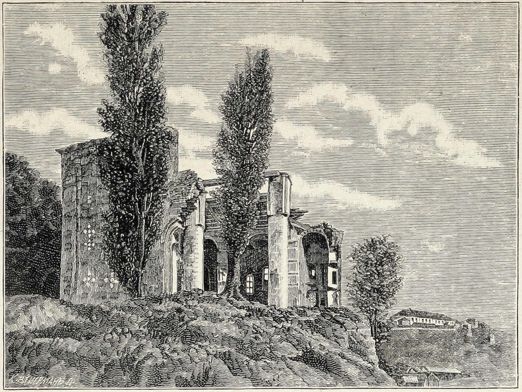 Беларуская (тарашкевіца): Горадня (Horadnia), Каложа (Kałoža). Царква Сьвятых Барыса і Глеба